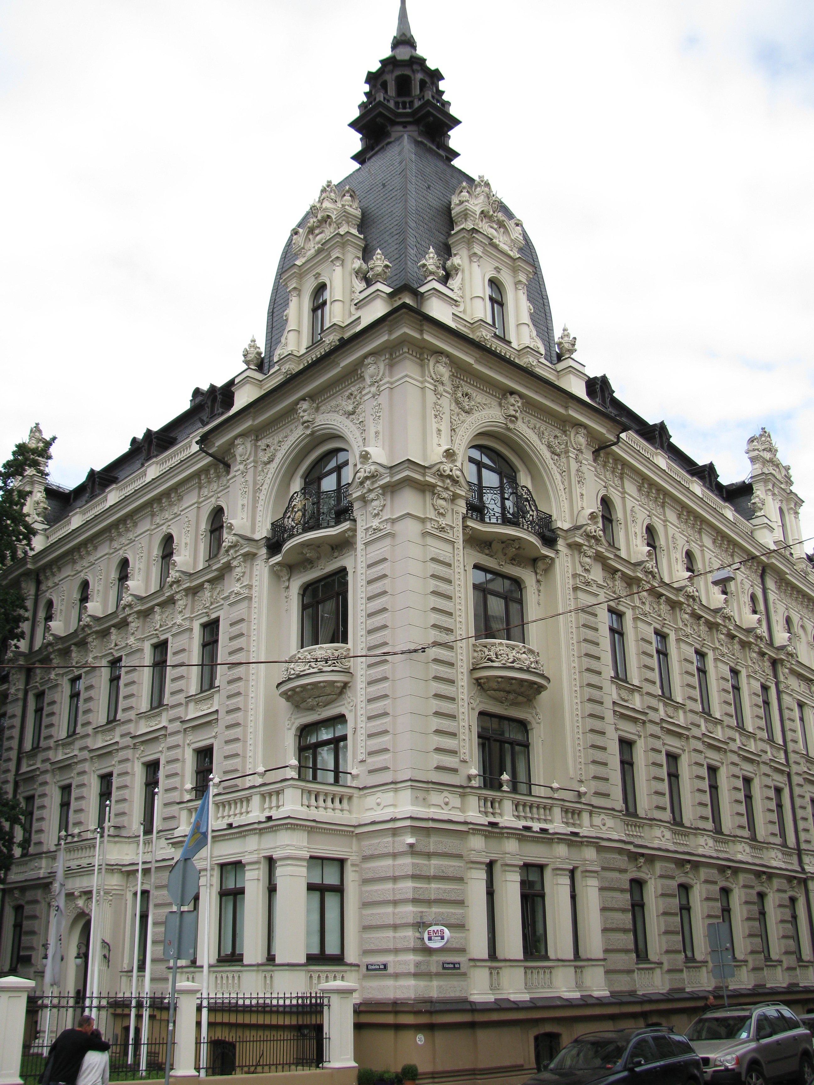 Īres nams, Rīga, Vīlandes iela 1